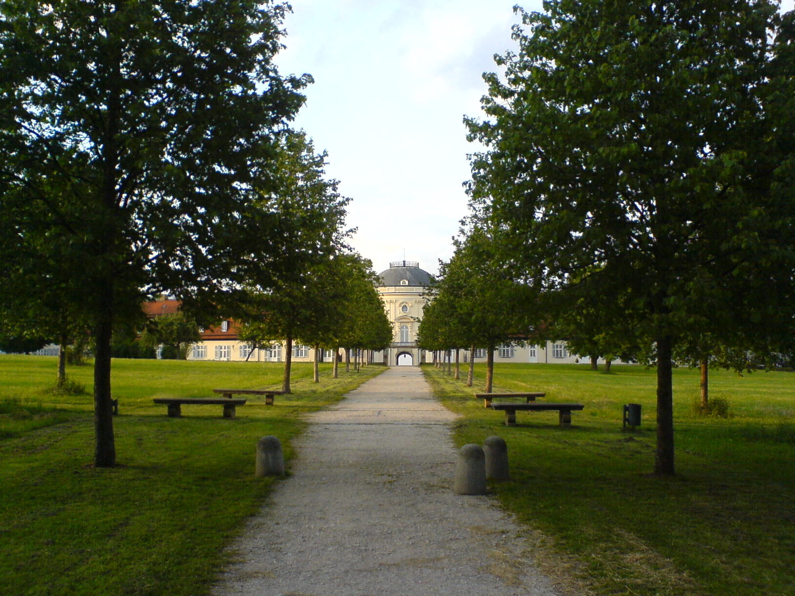 Das Photo zeigt Schloss Solitude von Süden.